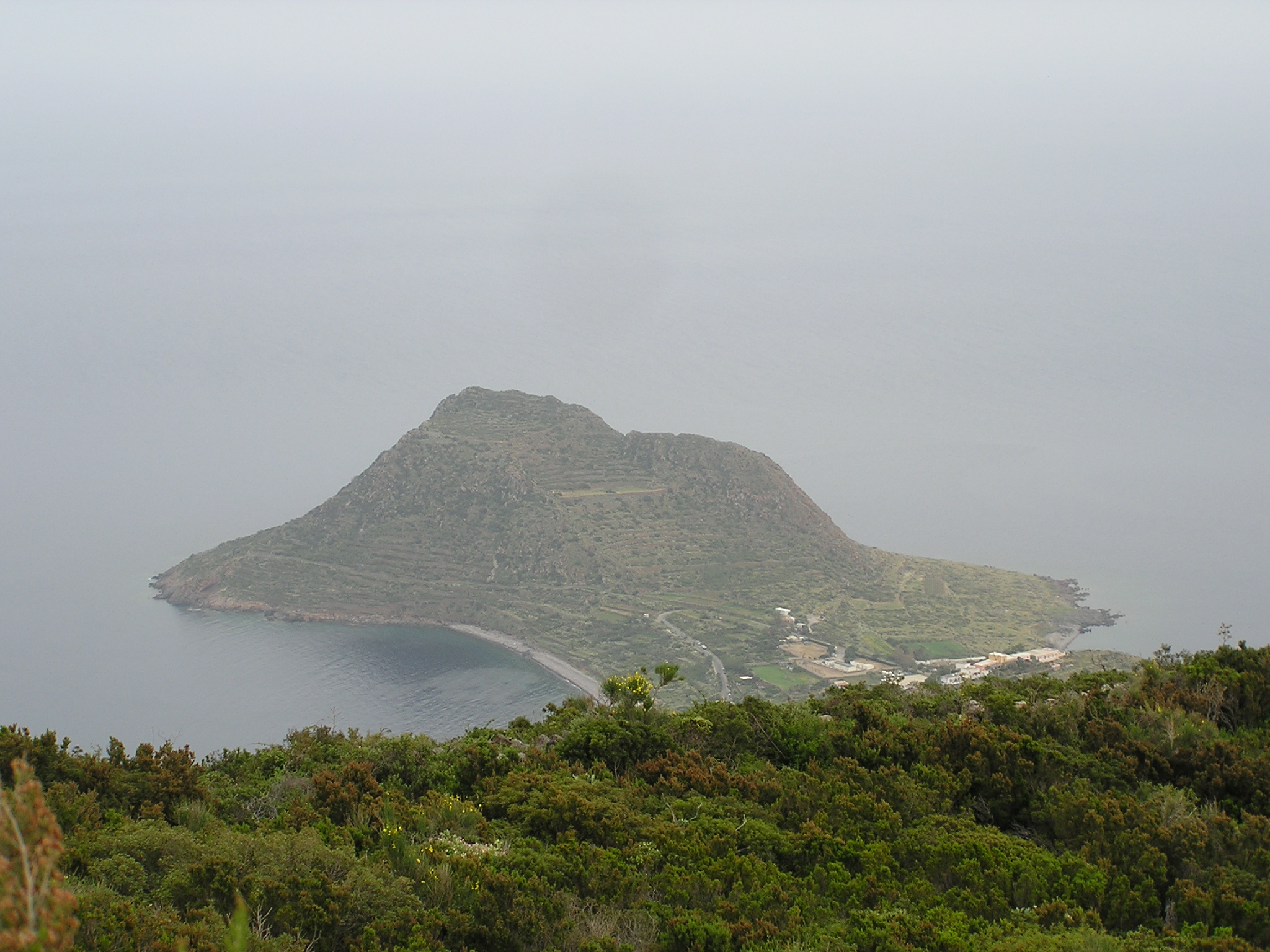 pohled na Capo Graziano z Fossa Felci